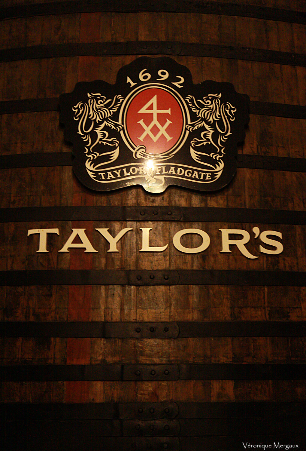 IMG_4092-1